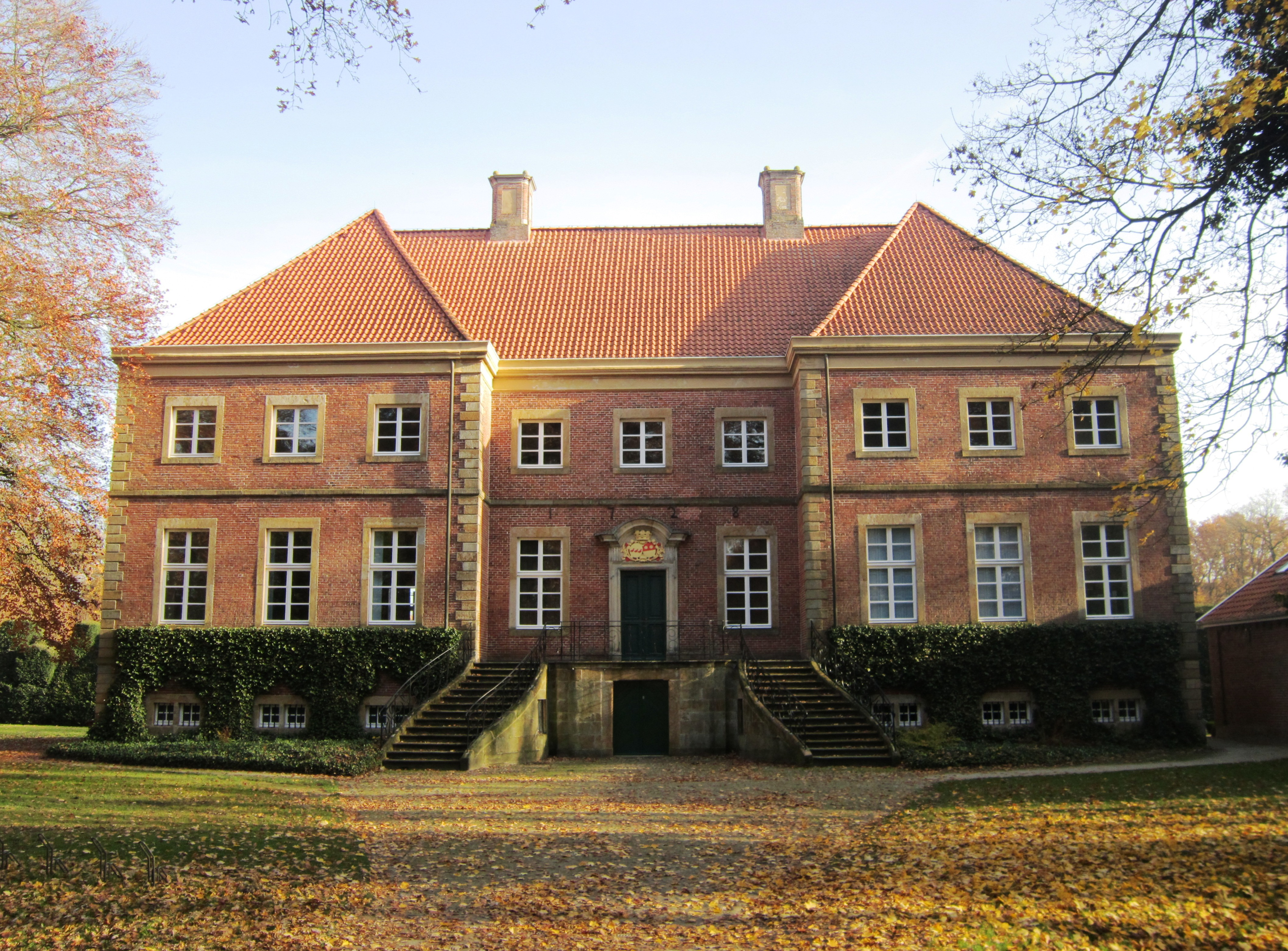 Gut Altenkamp - Aschendorf - Duitsland